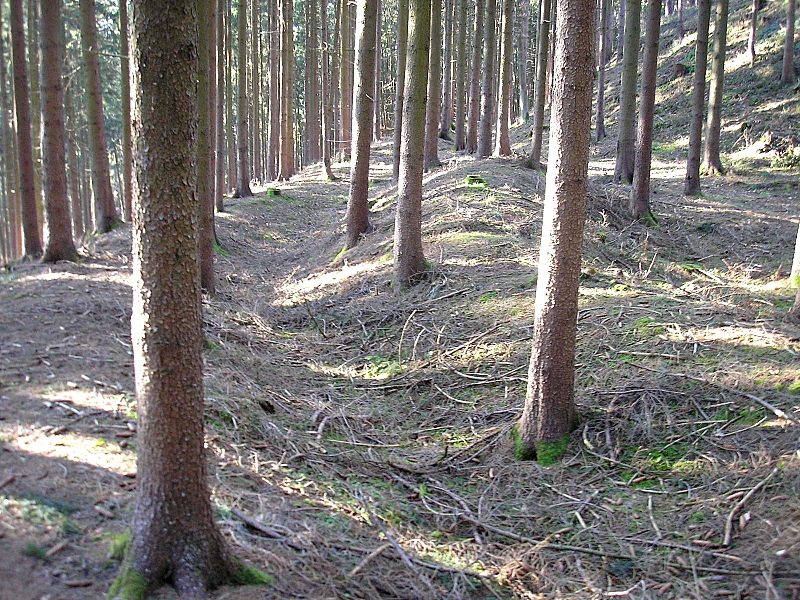 Burgstall Appertshausen (Petersdorf, Landkreis Aichach-Friedberg, Bayerisch-Schwaben). Die Erdwerke des östlichen Vorwerkes. Eigene Aufnahme, Jan. 2008 / Former Appertshausen castle near Petersdorf (Landkreis Aichach-Friedberg, Bavaria, Germany). The eartworks of the eastern bailey. Own photo, Jan. 2008